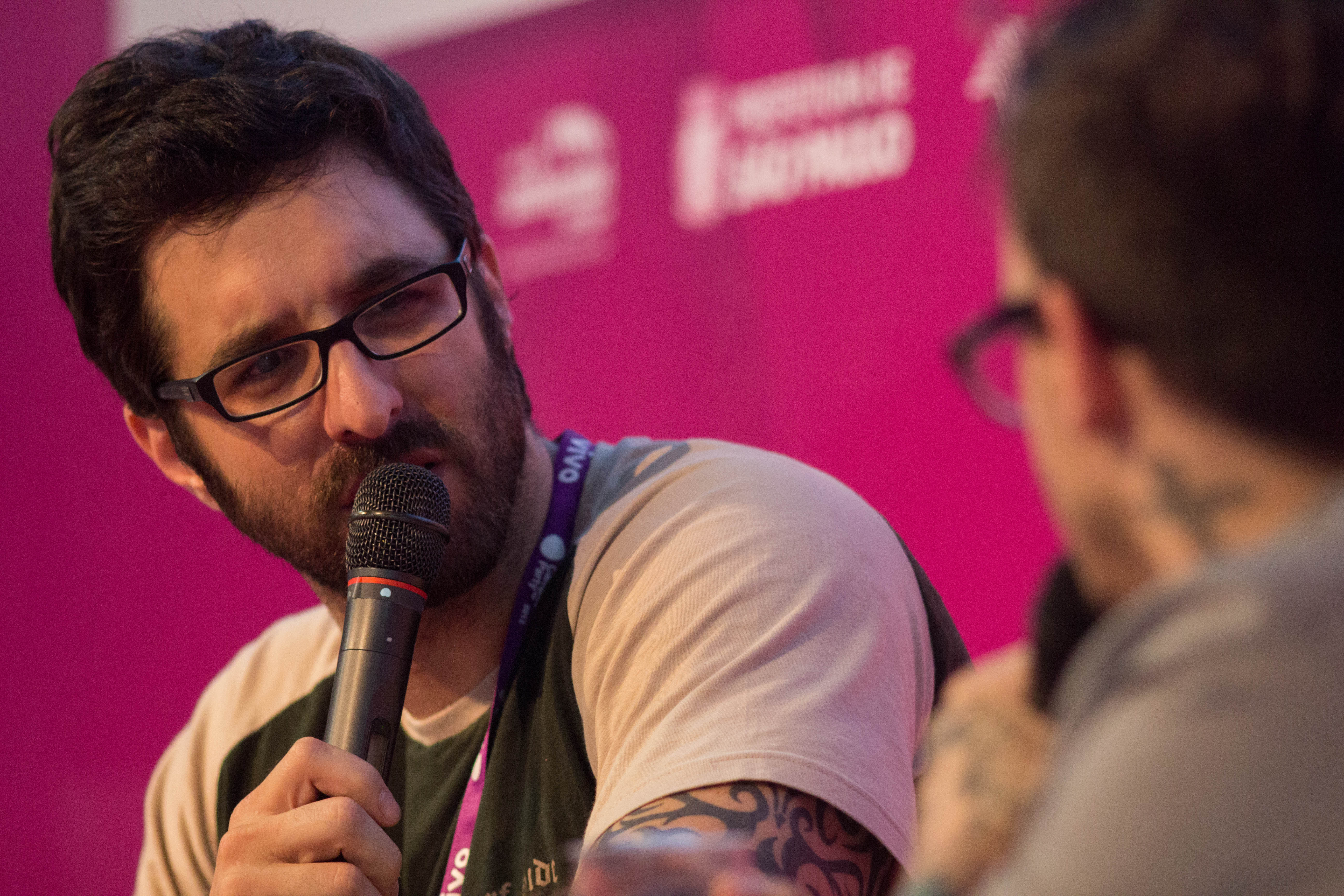 Rafinha Bastos em bate-papo com PC Siqueira - Campus Party Brasil - 01/02/2013 - Foto: Camila Cunha/indicefoto